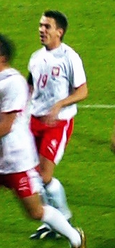 Łukasz Garguła